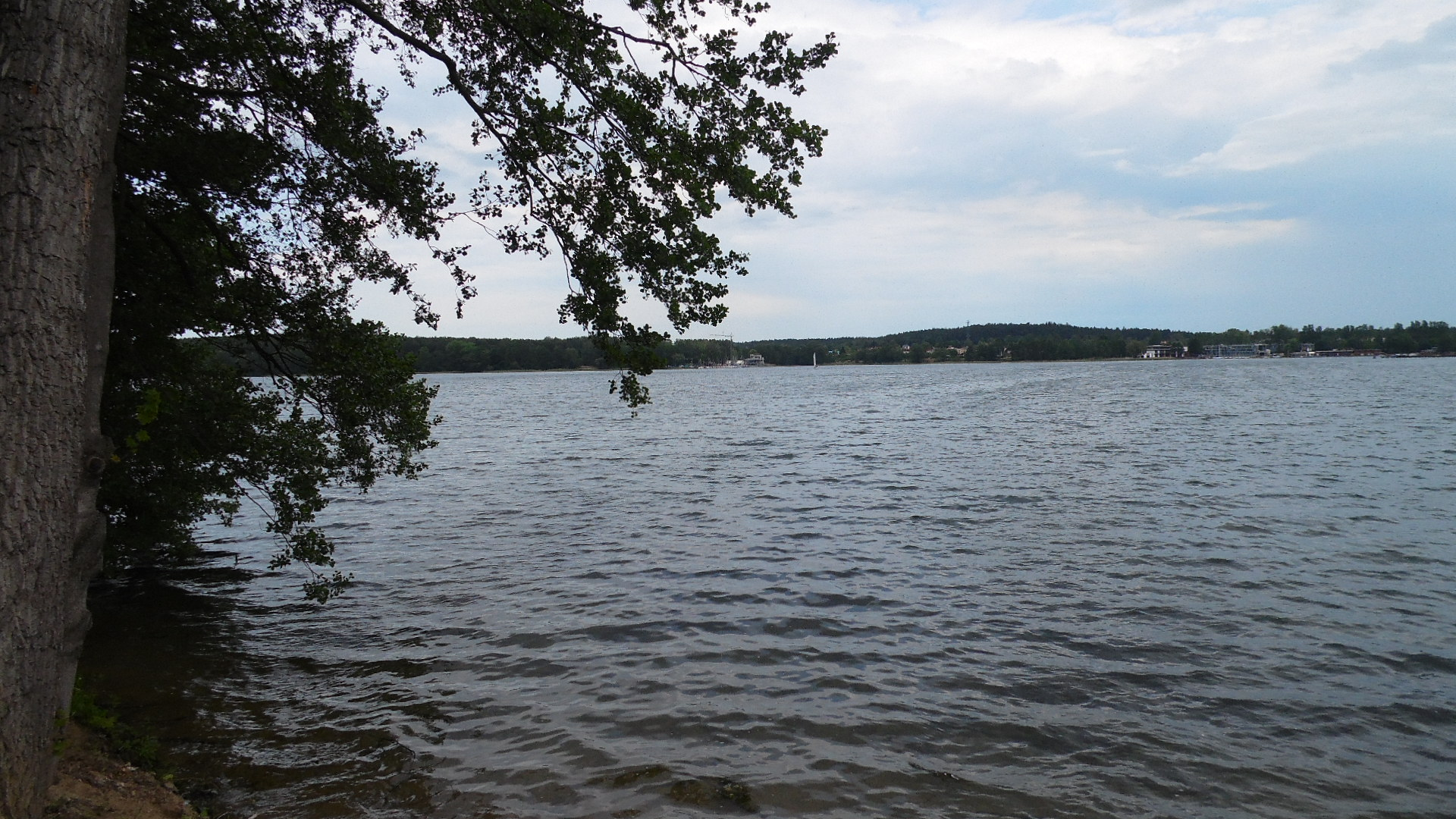 JEZIORO KRZYWE.